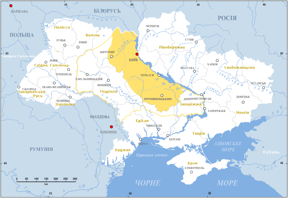 Правобережжя